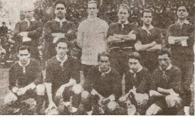 Club Atlético Independiente, 1922 Primera División champion.